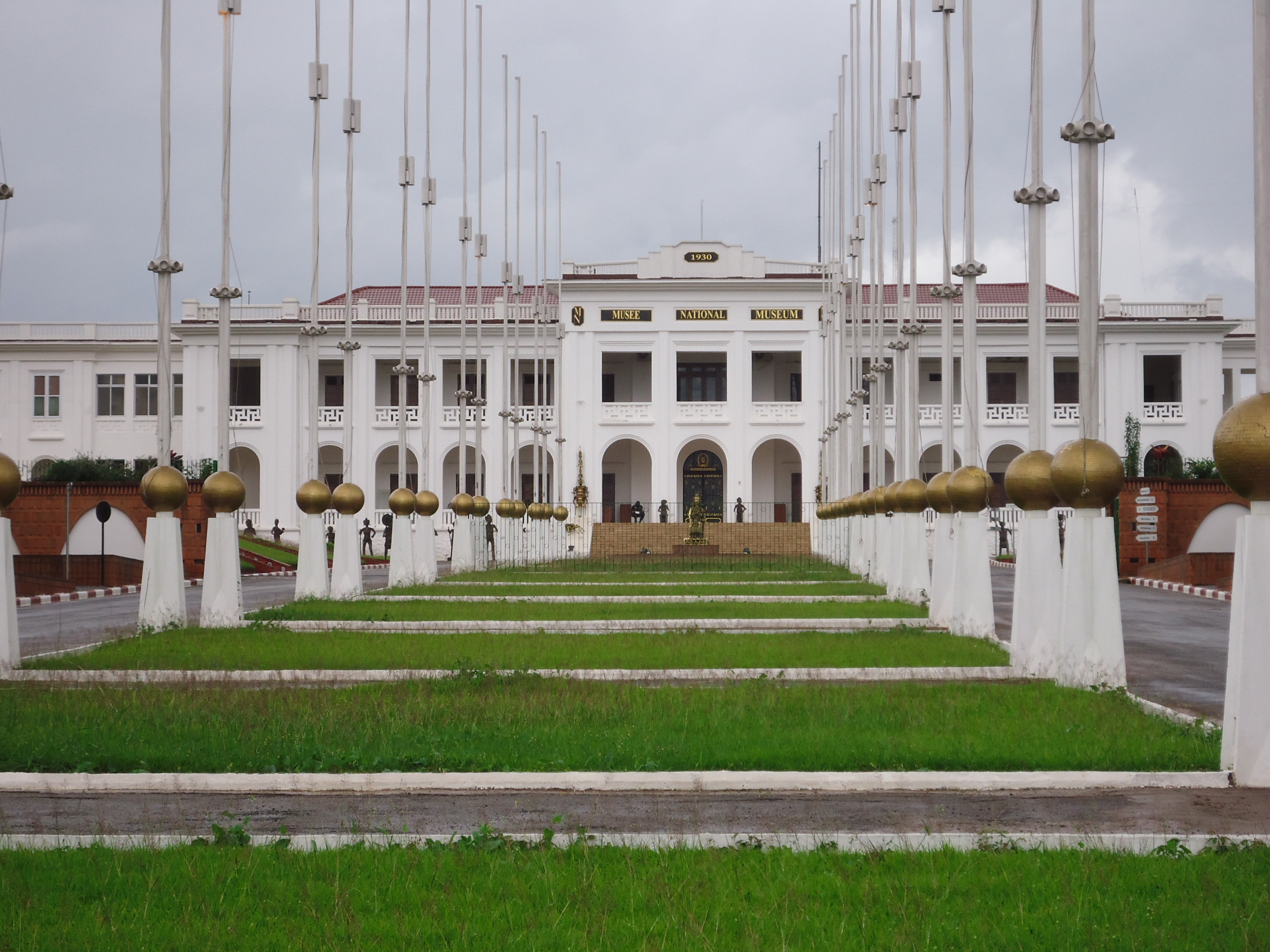 Musée national du Cameroun, Yaoundé.